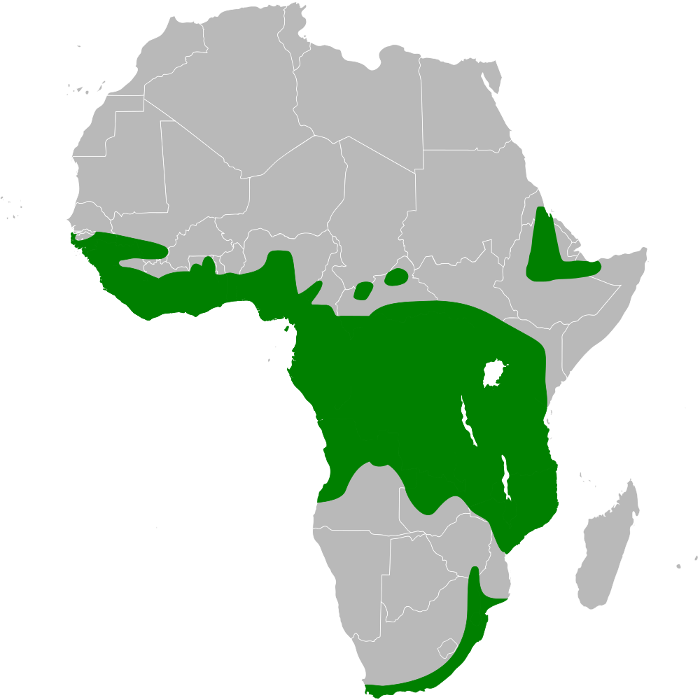 Psalidoprocne distribution map